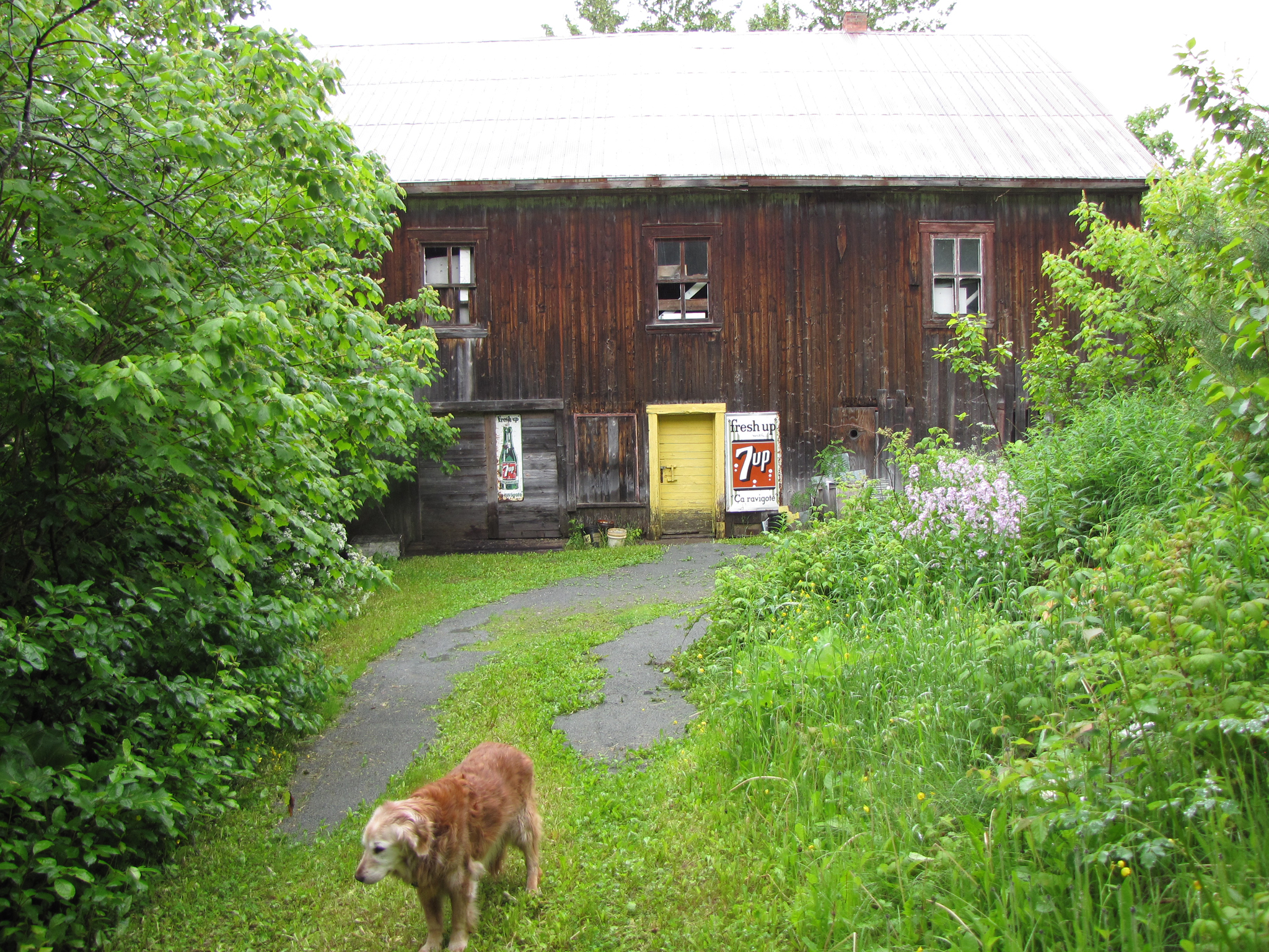 Moulin à eau, situé à Trois-Pistoles (Bas-Saint-Laurent, Québec), avec Delphie, notre golden retriever de 18 ans!